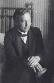 Математик, альпинист Борис Николаевич Делоне, 1924 год.